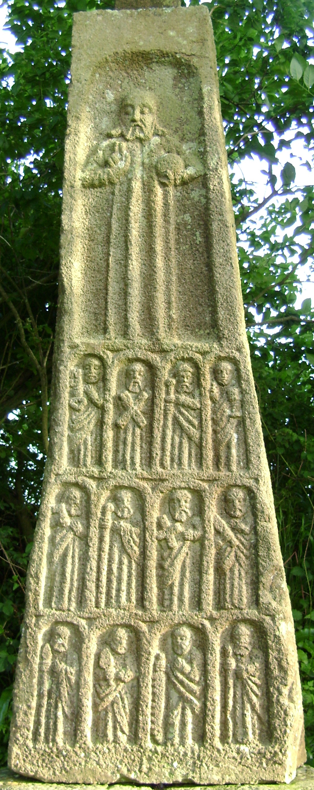 Rungléo, le Christ et les Apôtres.